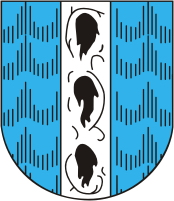 Wappen der Gemeinde Bregenz in Österreich Bregenz